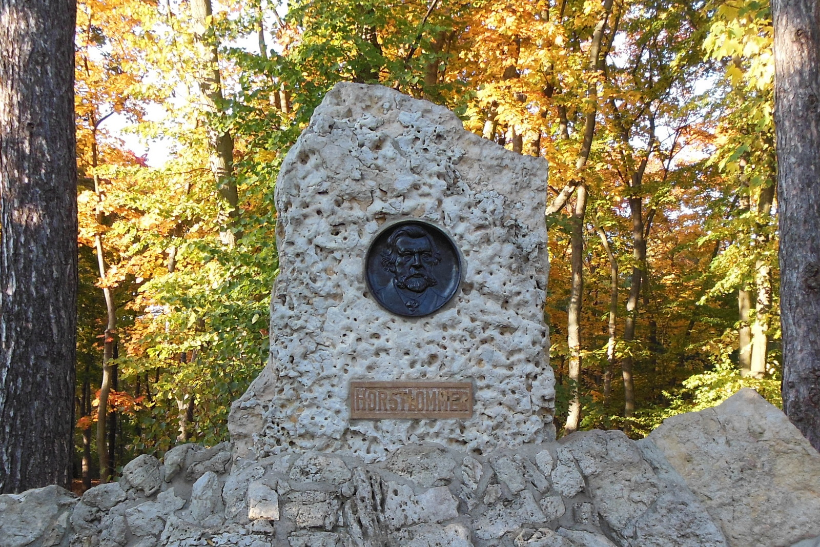 Eingeweiht vom Verschönerungsverein in Jena am 28.03.1903